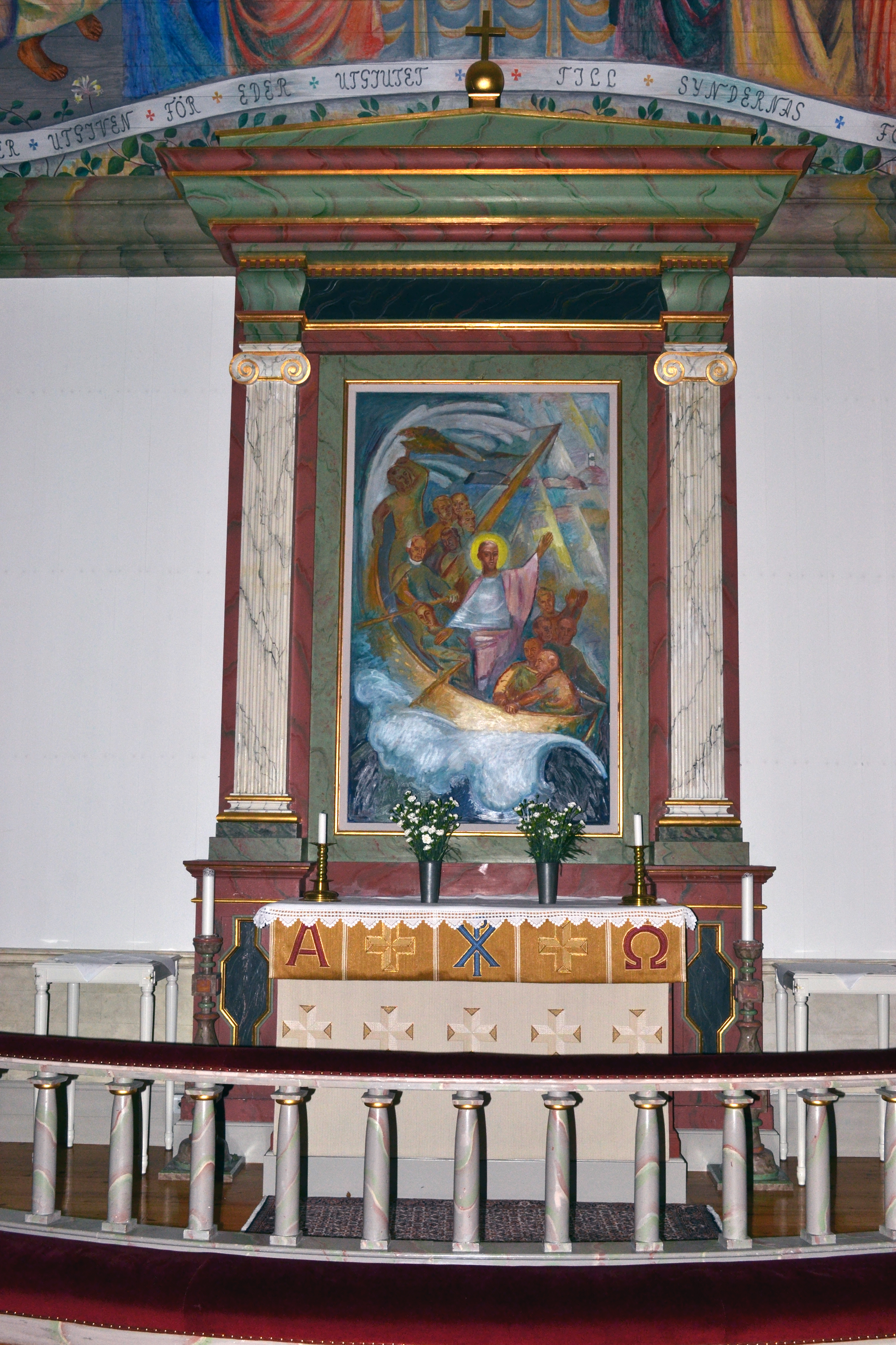 Träslövsläge kyrka, Träslövs församling, Göteborgs stift. Interiör.